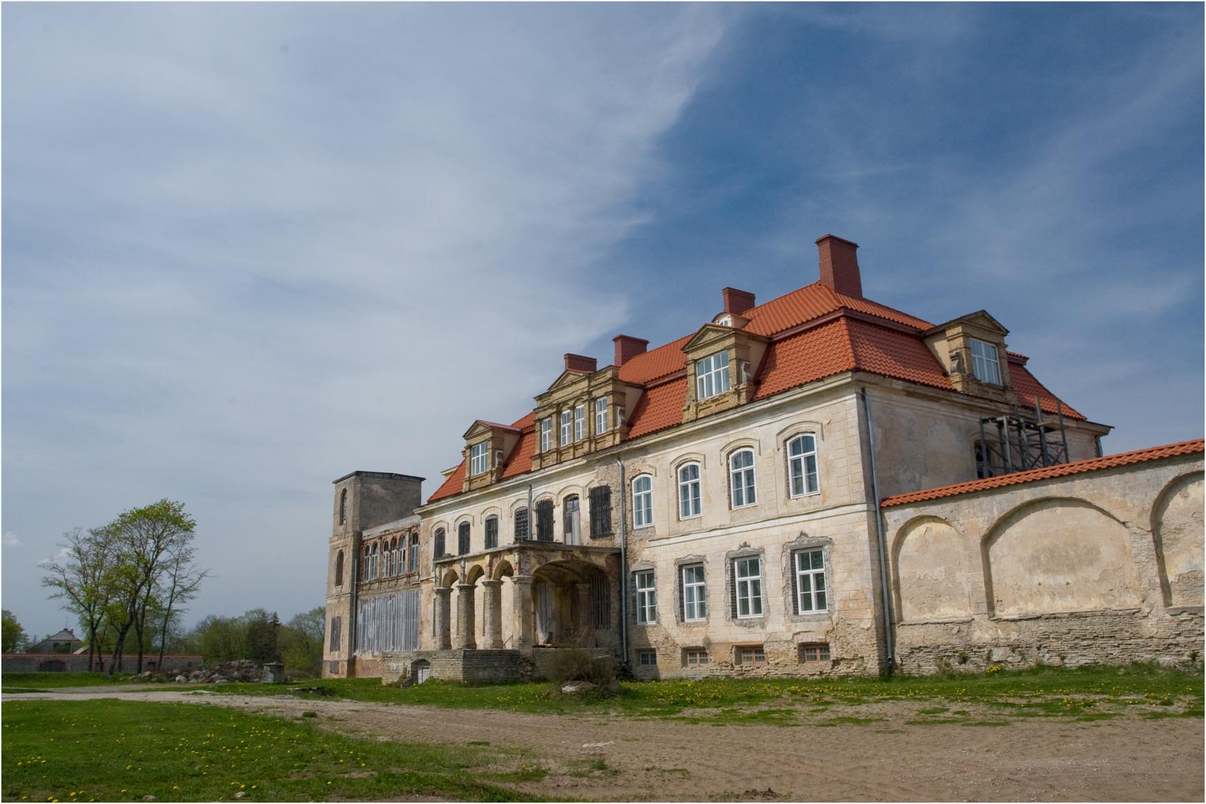 Malla mõisahoone